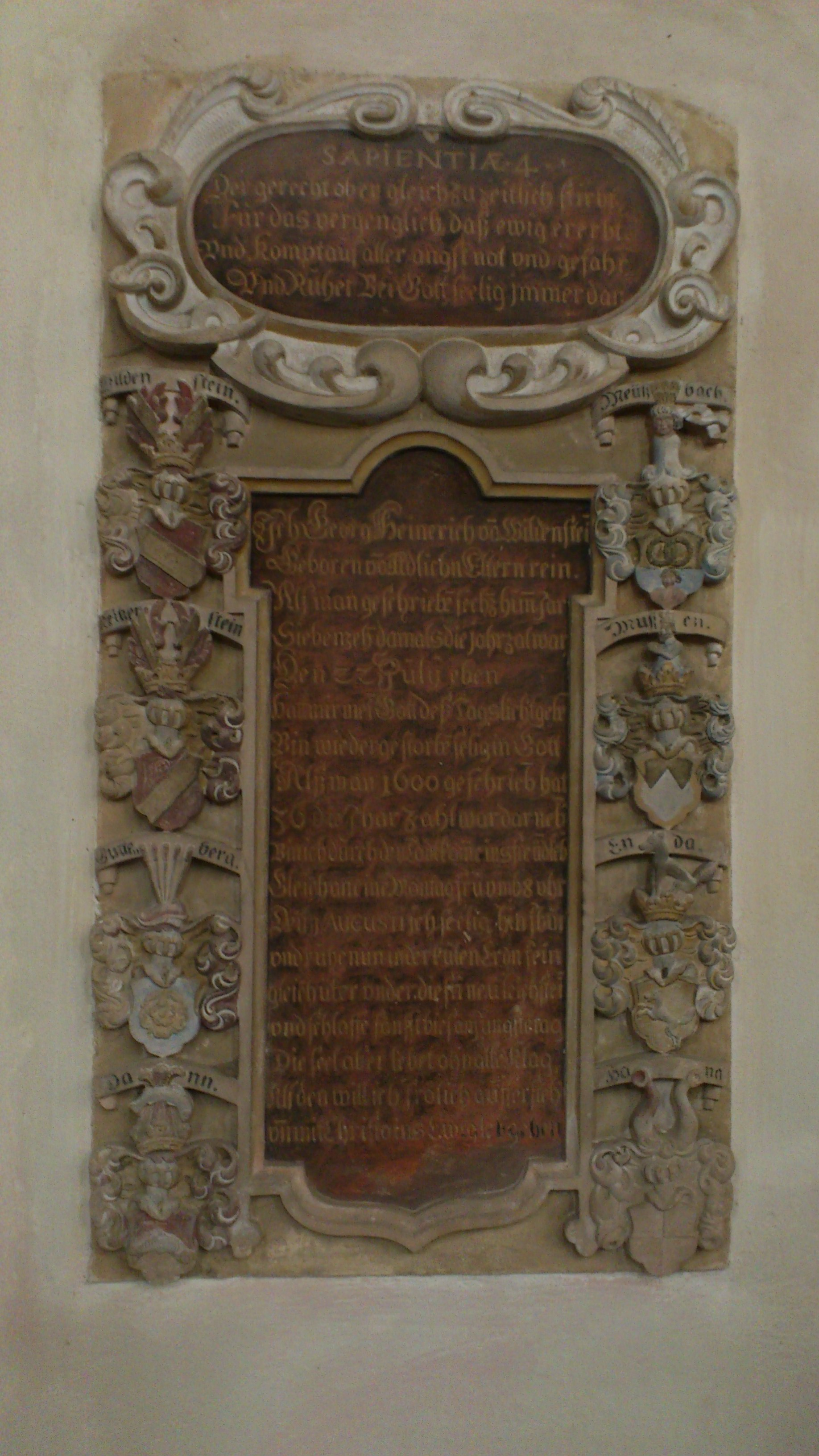 Grafengehaig, Wehrkirche, Grabmal Wildenstein mit Ahnenwappen